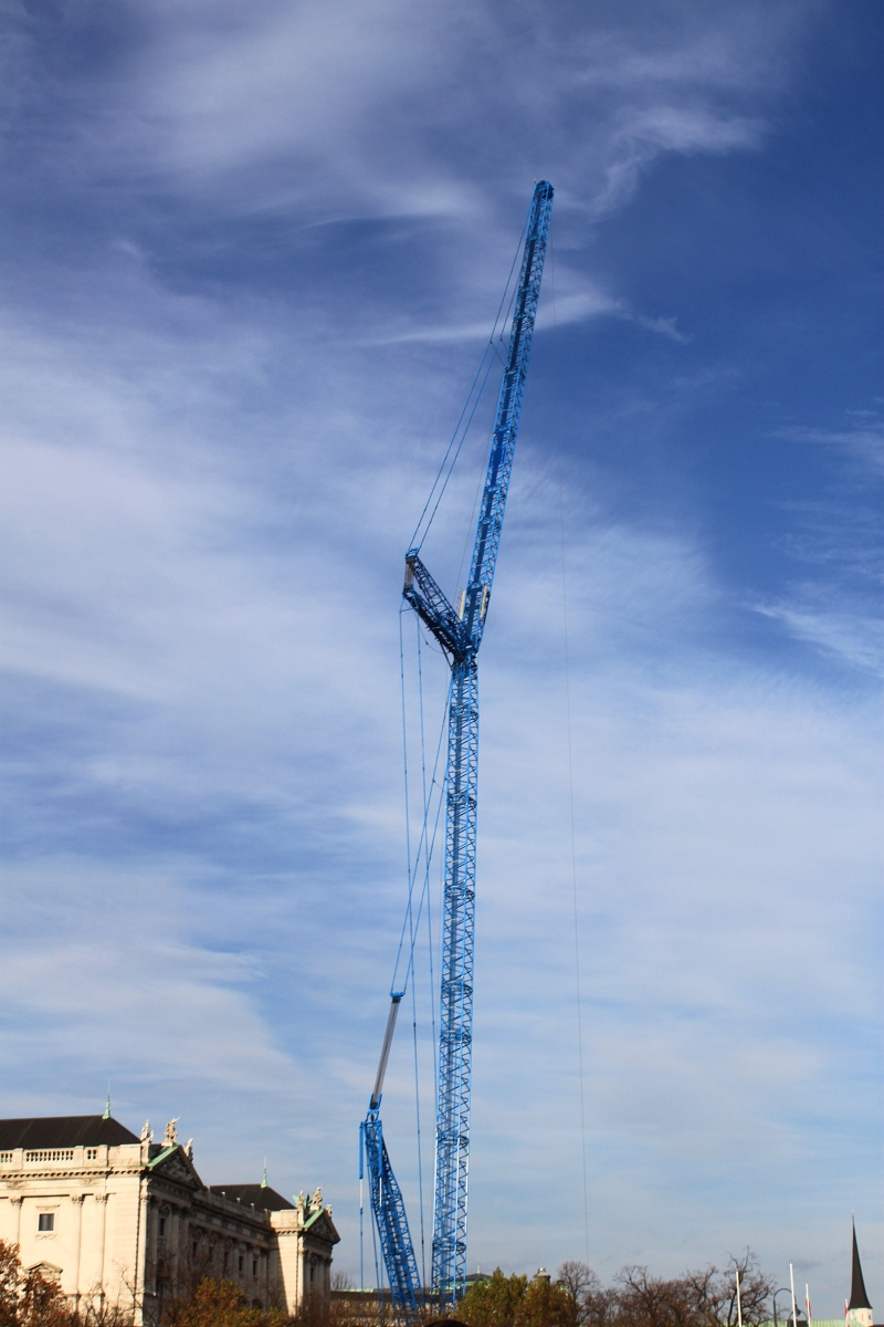 Liebherr Raupenkran LR1600/2 mit 200m-Ausleger am Heldenplatz als Bungee-Kran